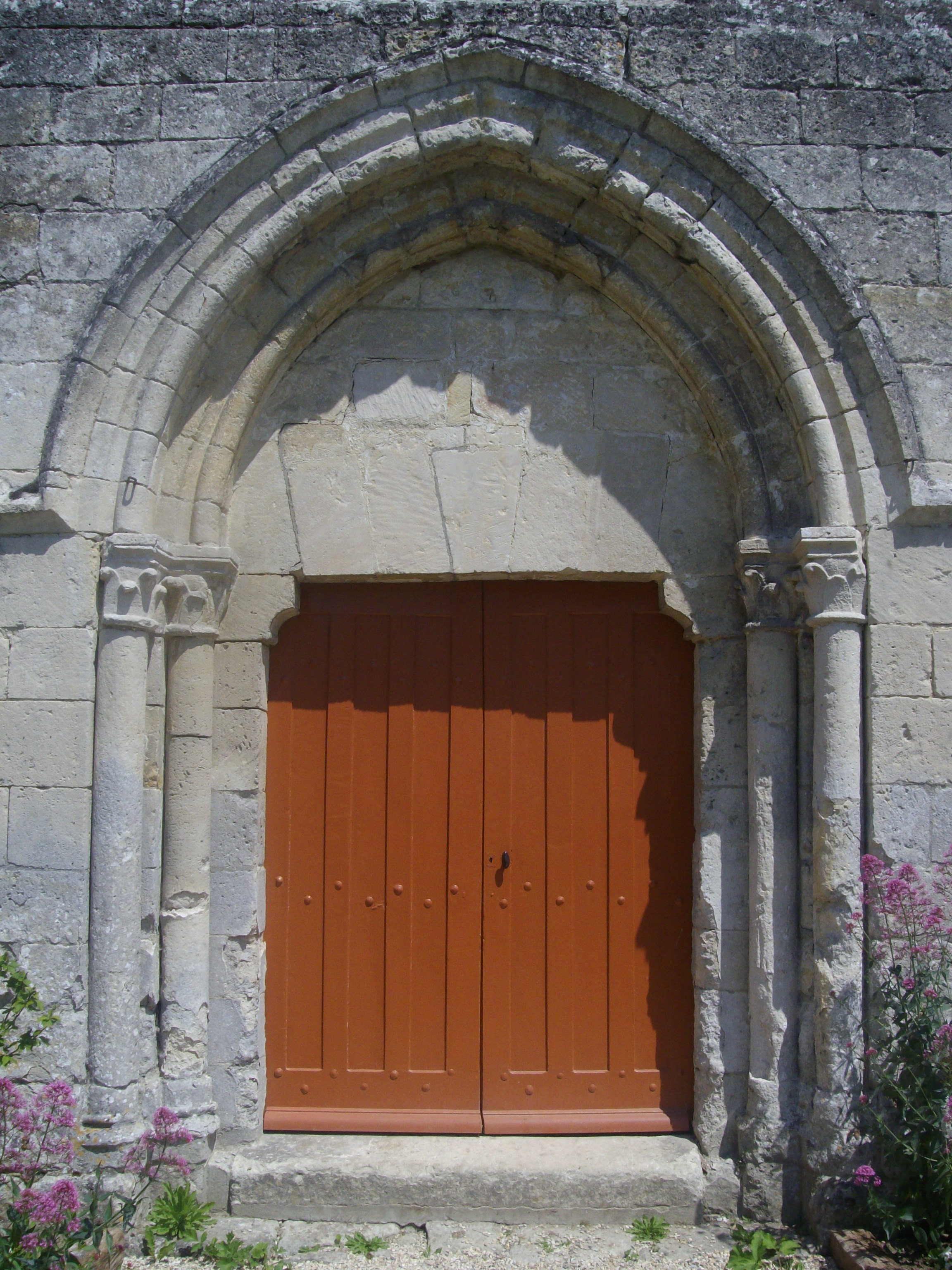 Porte de l'église Notre-Dame de Pondron, Fresnoy-la-Rivière